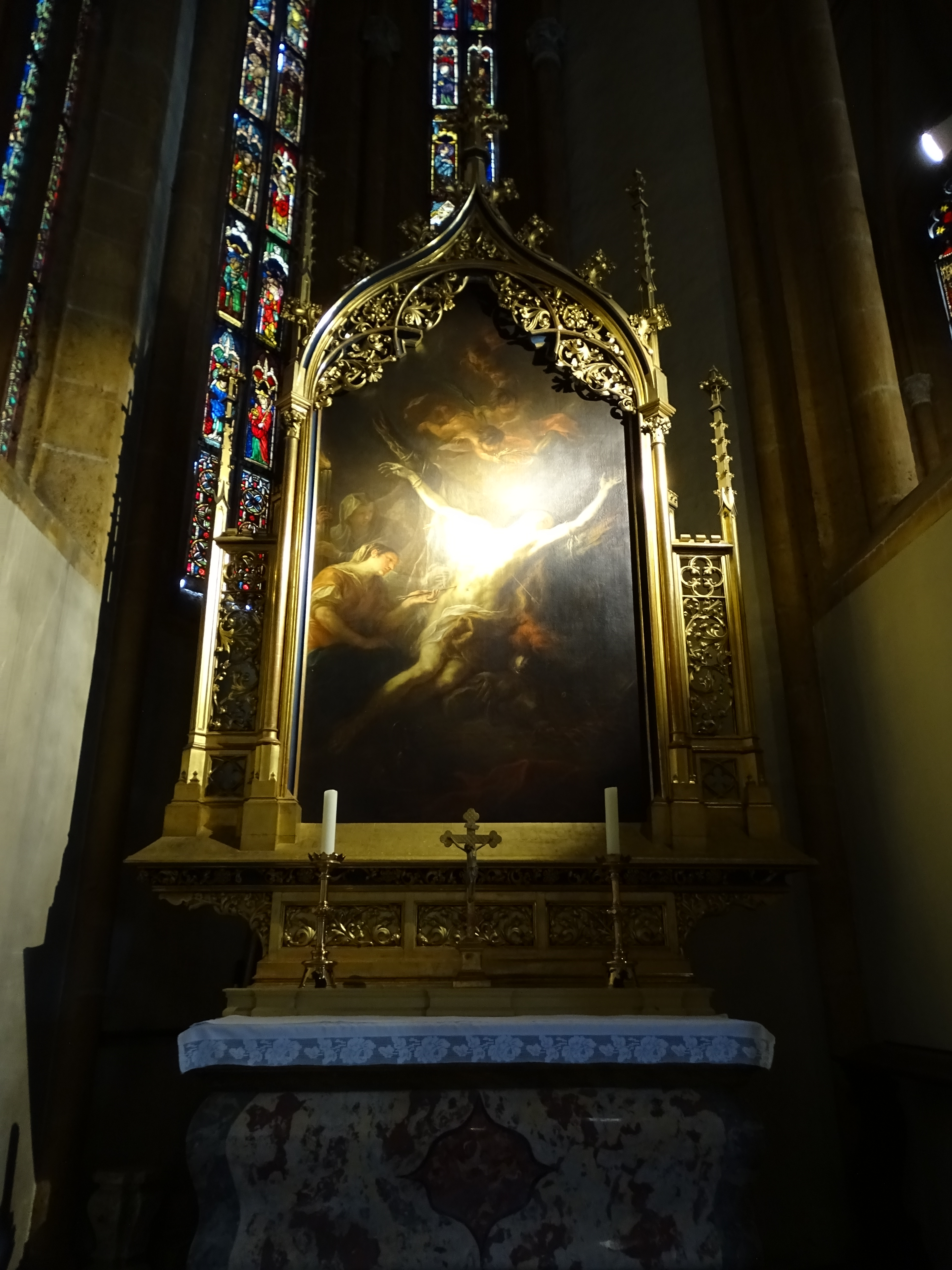 Der Sebastian-Altar in der Wallfahrtskirche Maria Straßengel